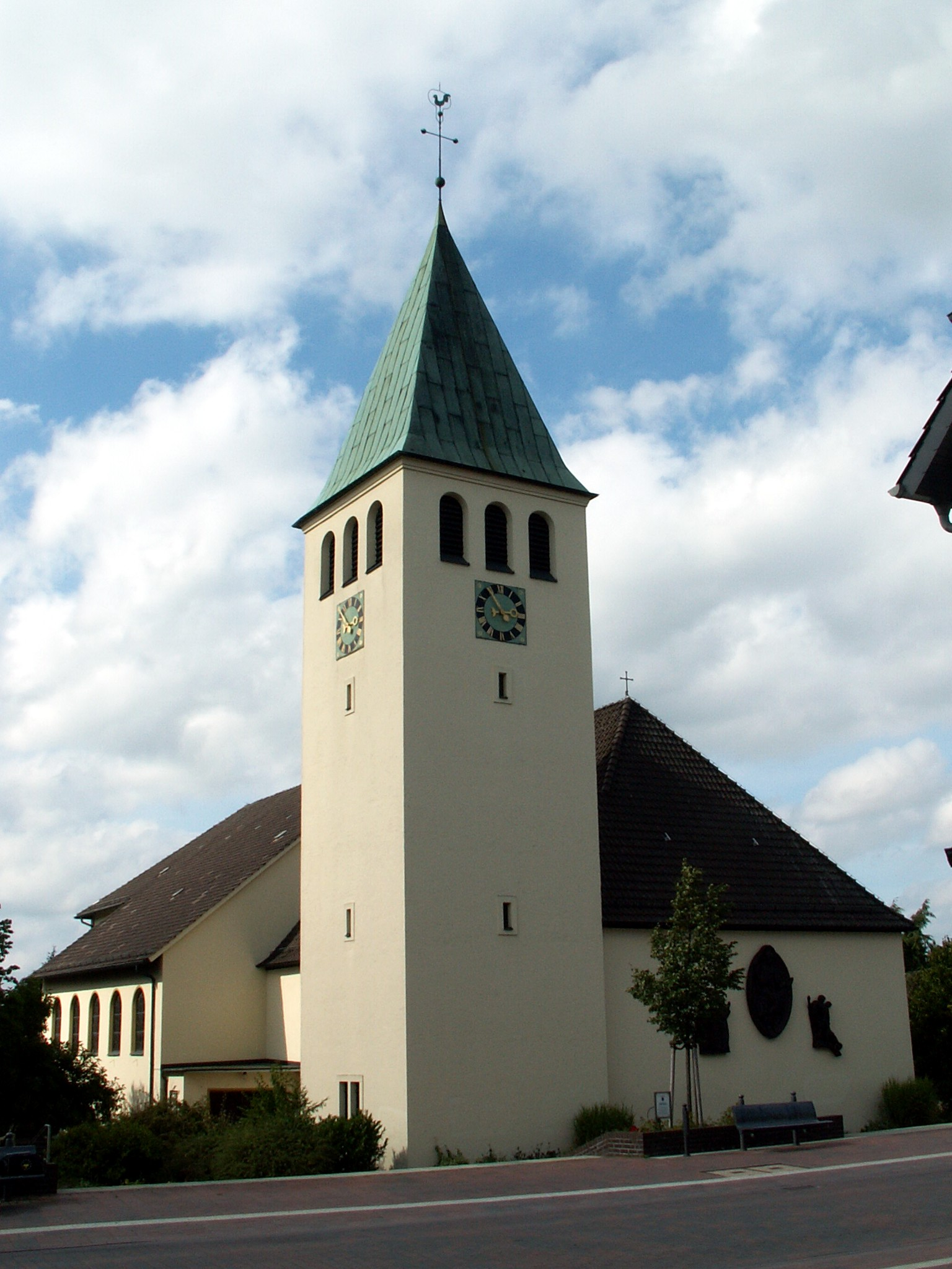 Katholische Kirche St. Johann in Bohmte, Bremer Straße 57, Ansicht von Südosten